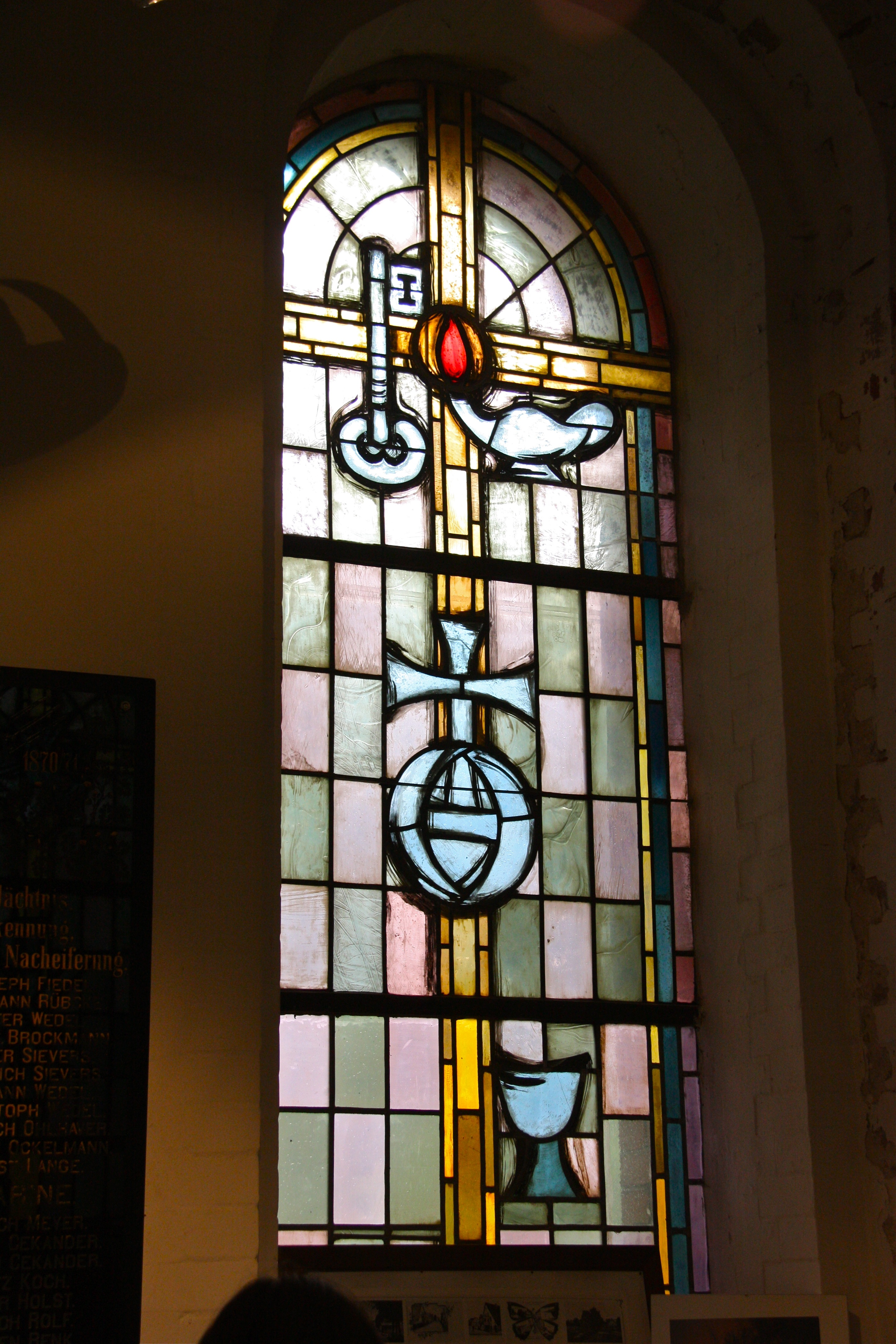 Hamburg, Altenwerder, Kirche St.Gertrud, Fenster neben dem alten Eingang